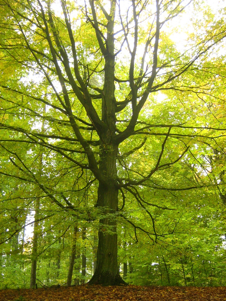 Hainbuche in den Brohmer Bergen bei Rothemühl (Landkreis Uecker-Randow, Vorpommern).